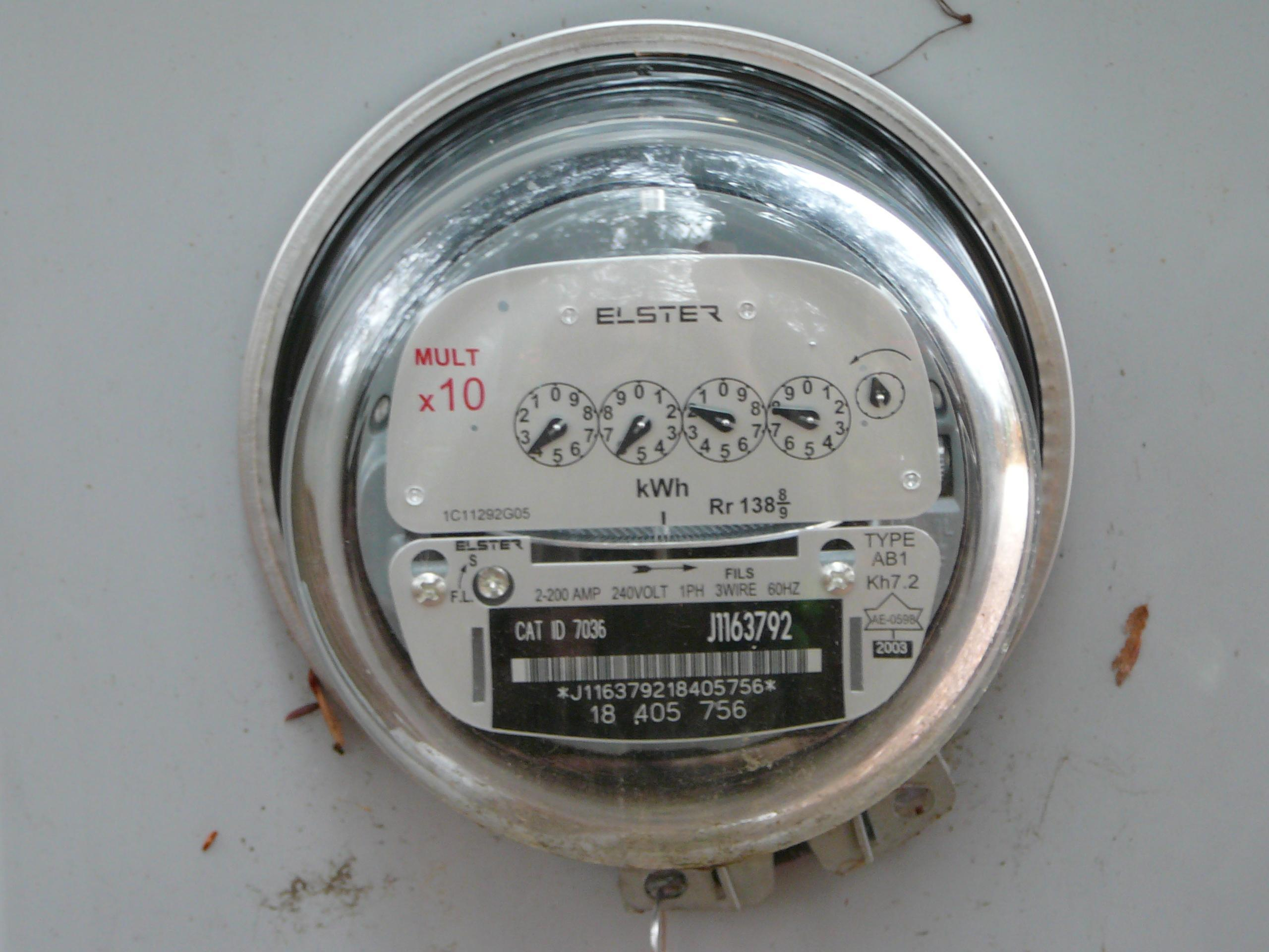 Stromzähler in Kanada